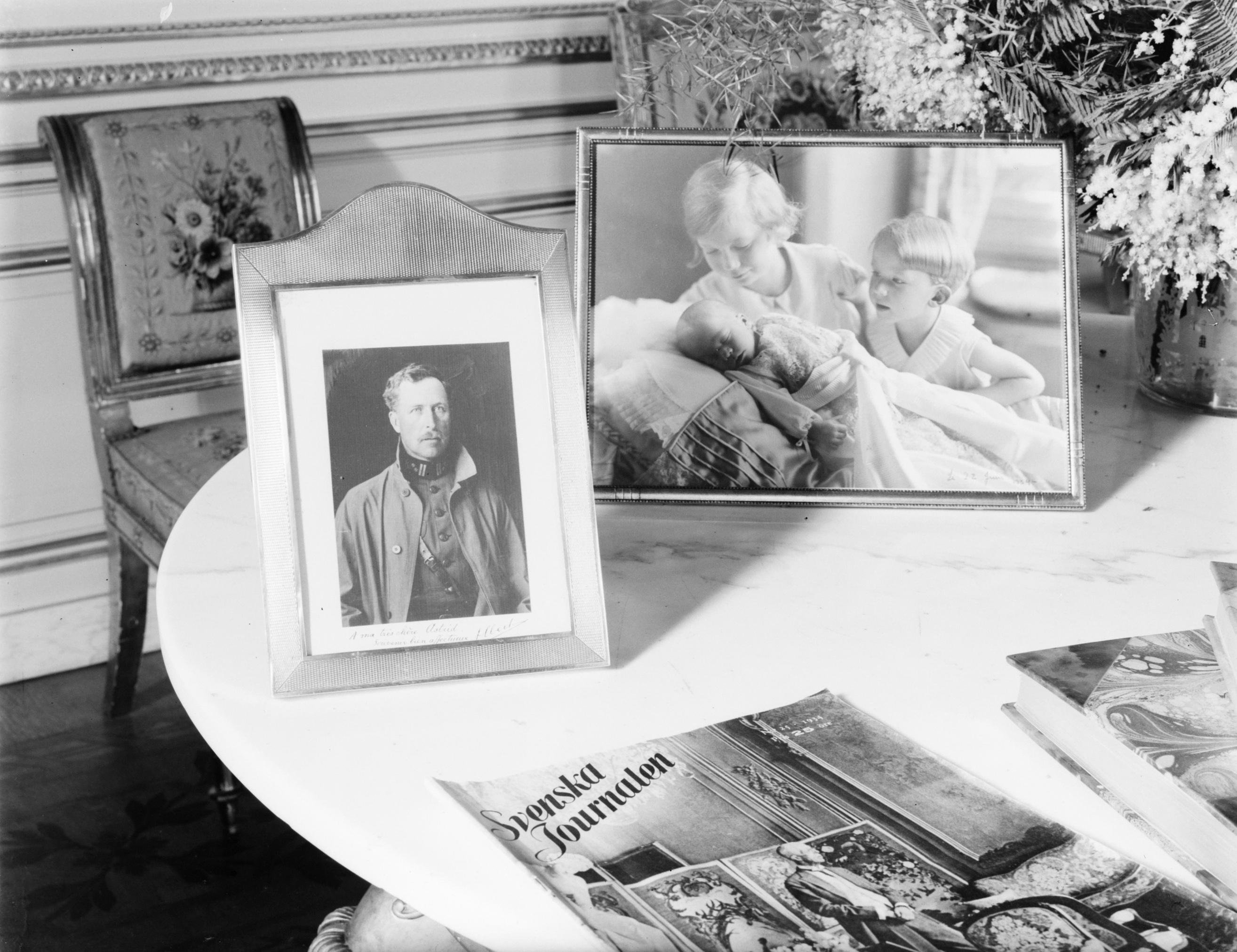 Collectie / Archief : Fotocollectie Van de Poll Reportage / Serie : Koningshuis België Beschrijving : Tafel in het paleis met daarop een Zweeds tijdschrift en ingelijste foto's van koning Albert van België en van prinses Josephine Charlotte en prins Boudewijn die zich over de wieg van hun broertje Albert buigen Datum : 6 juni 1934 Locatie : België Trefwoorden : foto's, tijdschriften, vorstenhuizen Persoonsnaam : Albert (prins België), Albert I (koning België), Boudewijn (kroonprins België), Josephine-Charlotte (prinses België) Fotograaf : Poll, Willem van de Auteursrechthebbende : Nationaal Archief Materiaalsoort : Negatief (zwart/wit) Nummer archiefinventaris : bekijk toegang 2.24.14.02 Bestanddeelnummer : 254-6168